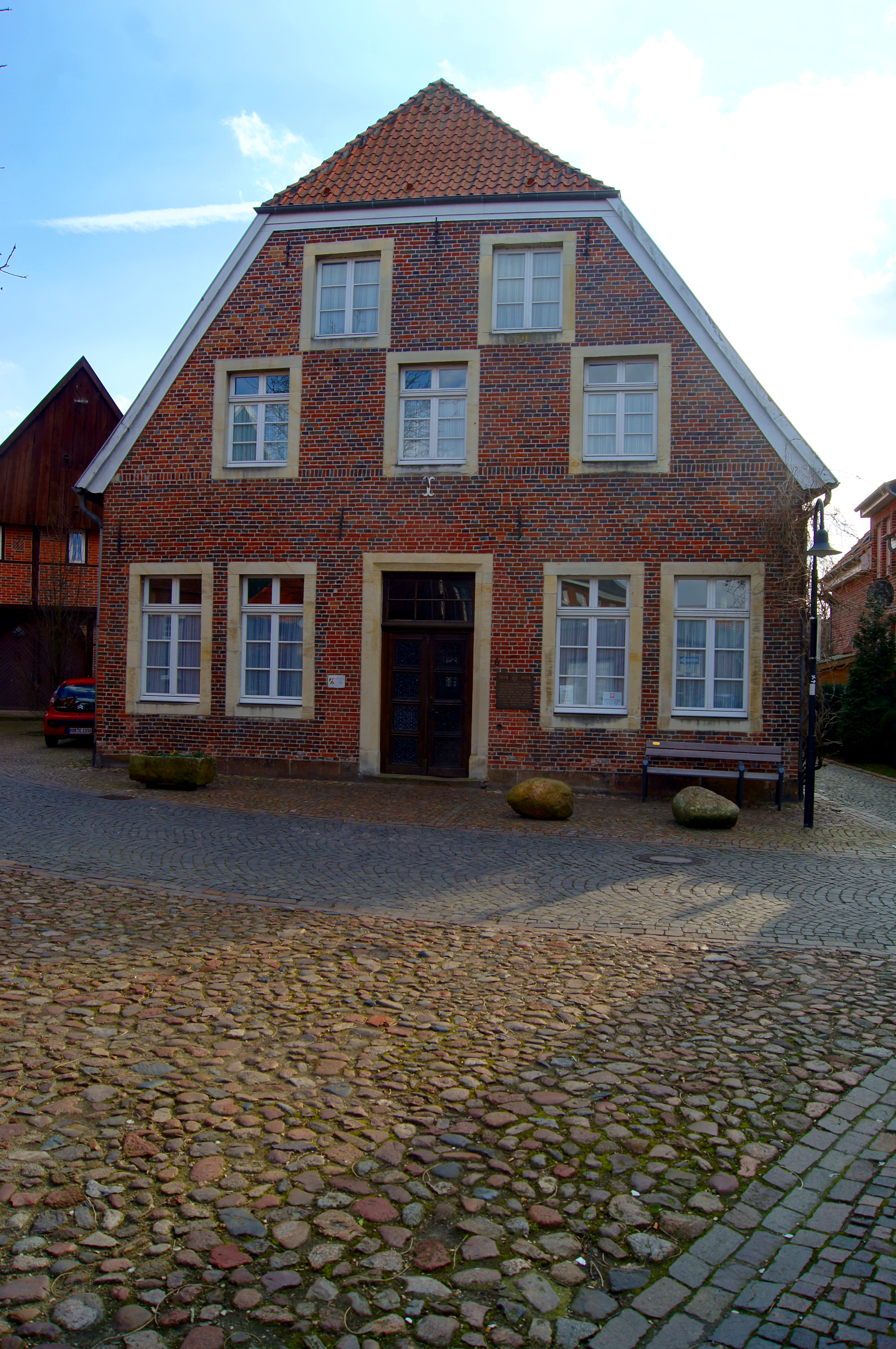 Das Wesslingsche Haus ist ein Baudenkmal im Ortszentrum von Legden im Münsterland (NRW, Deutschland).Das Straßenpflaster im Vordergrund besteht aus Geschiebe der eiszeitlichen Grundmoräne der Saale-Kaltzeit. Auf dem Höhepunkt der Vereisung vor etwa 200 bis 250 Tausend Jahren lag das gesamte Münsterland unter einer bis zu 300 Meter dicken Eisdecke.